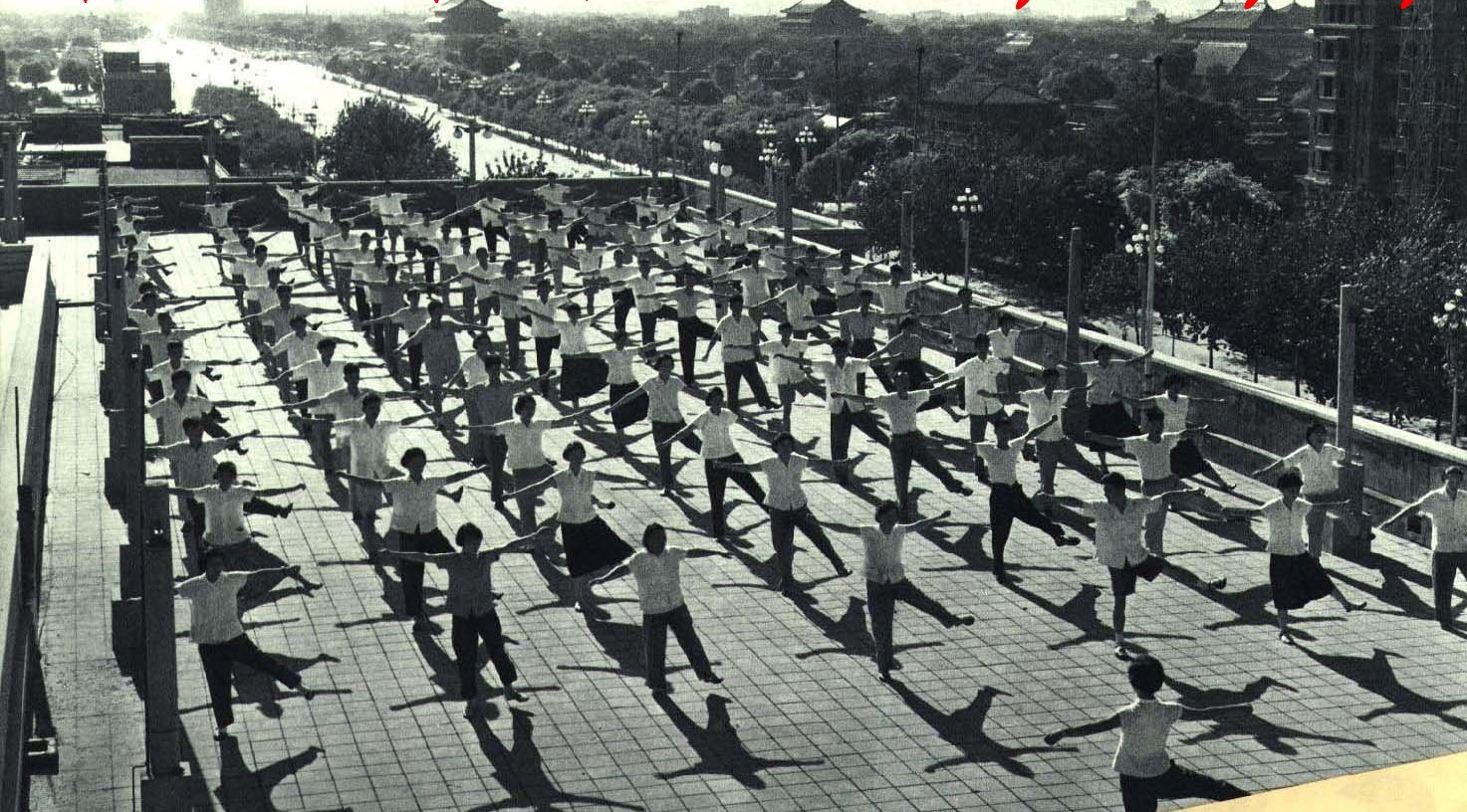 1965-10 1965年 体操